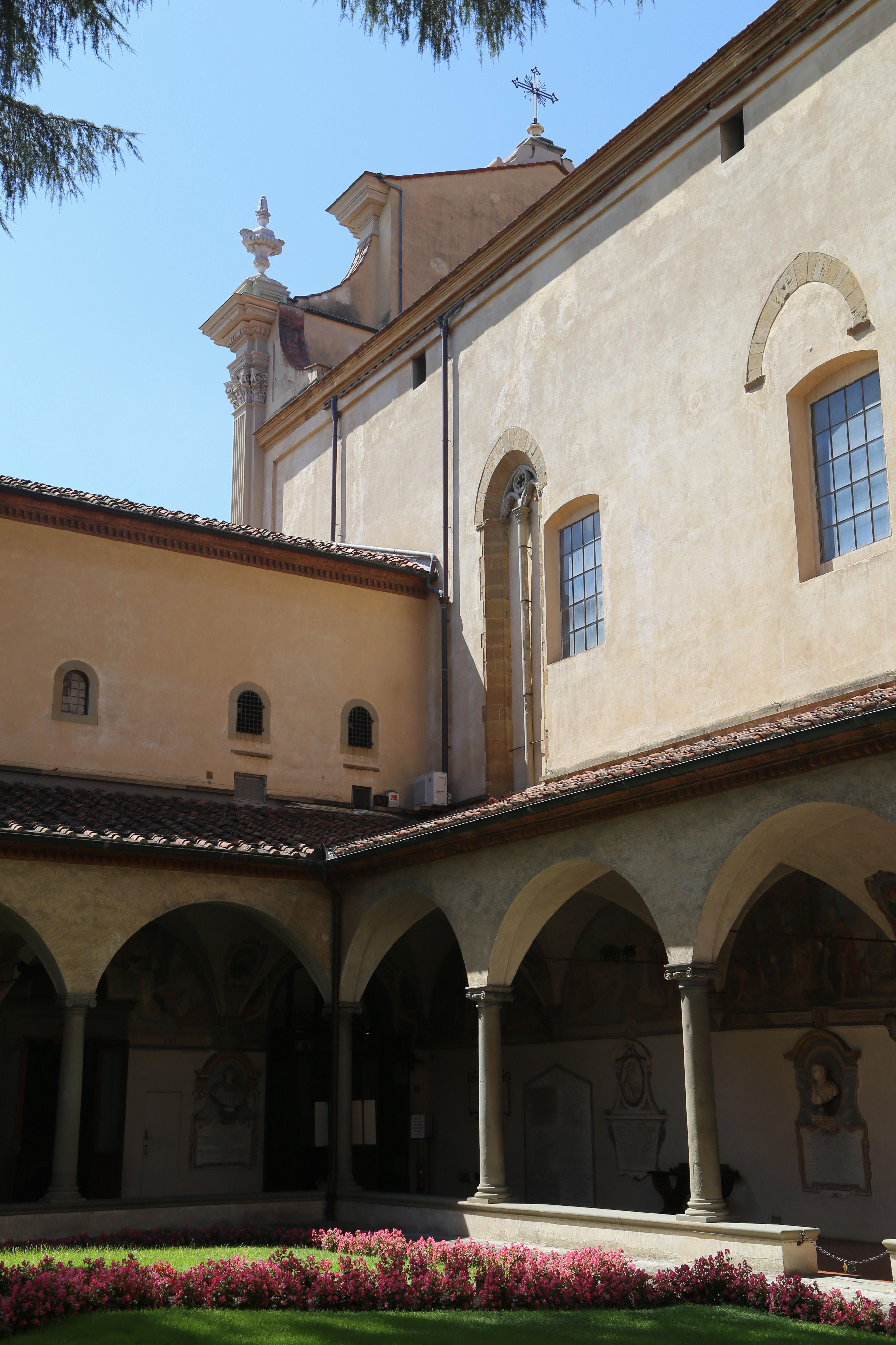 San Marco, Florenz